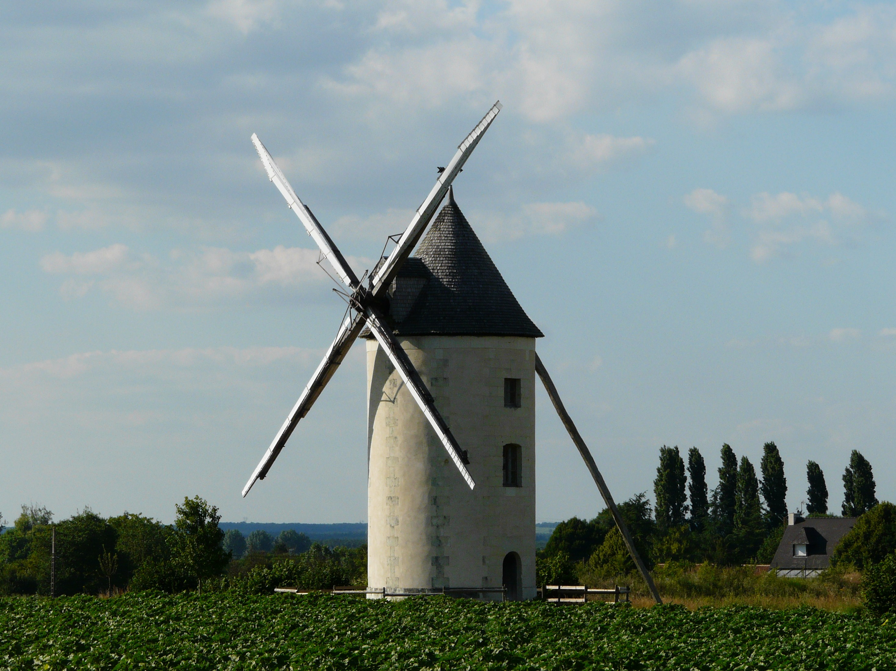 Moulin à vent du gué Sainte-Marie, Les Trois-Moutiers, Vienne, France